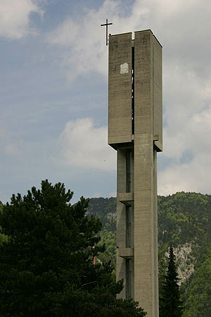 Moutier: Eglise Notre-Dame de la Prévoté (1965)